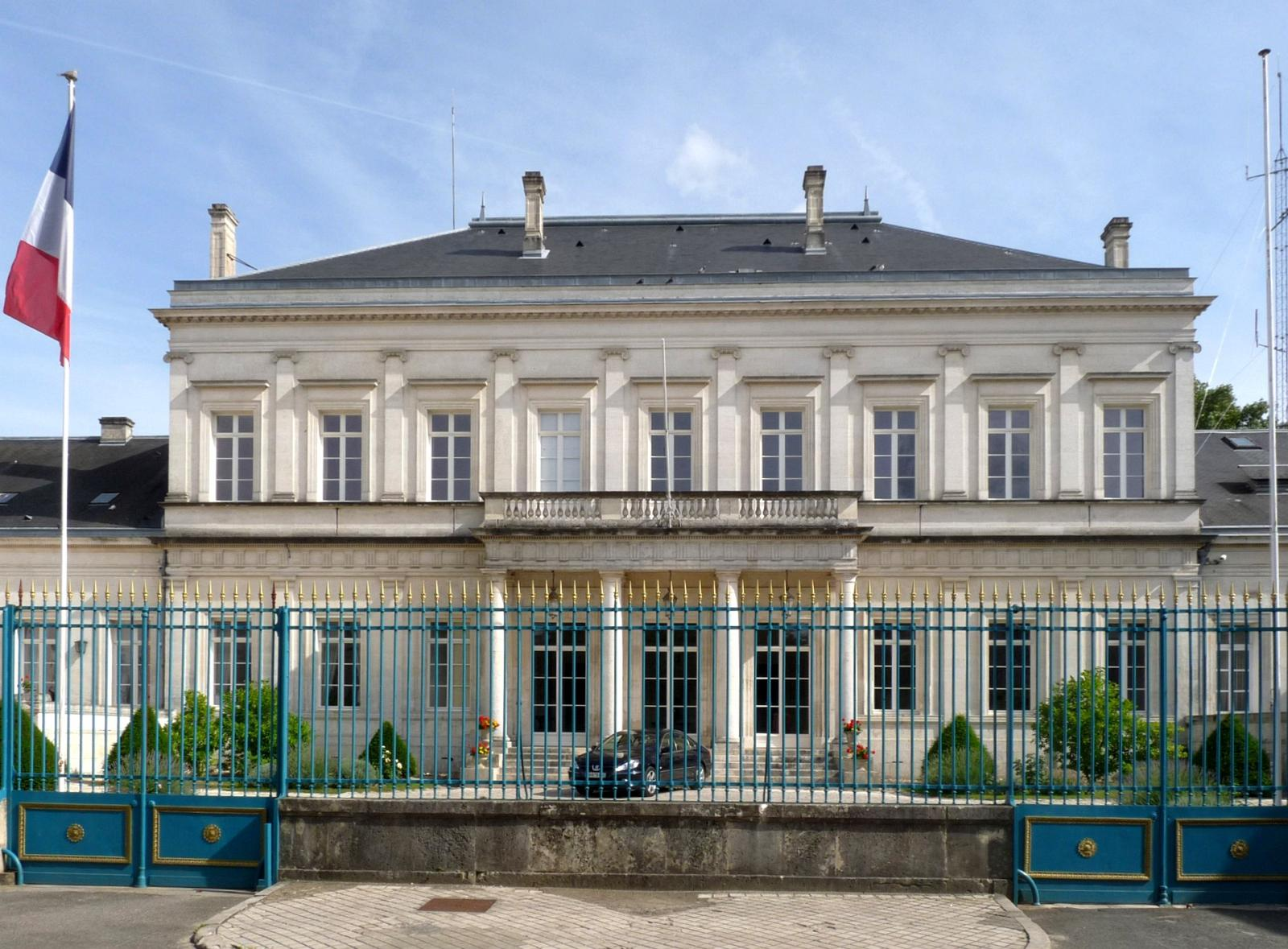 Préfecture de la Charente à Angoulême, France